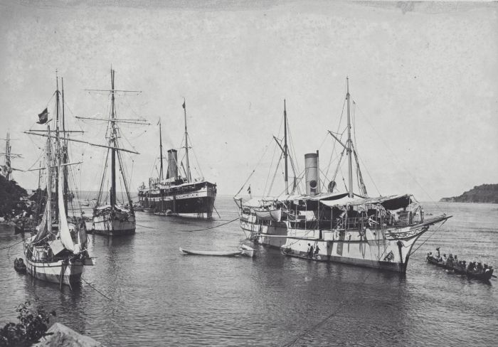 foto. Vooraan ligt de "Raaf" van de Gouvernements Marine.. Schepen in de Baai van Gorontalo